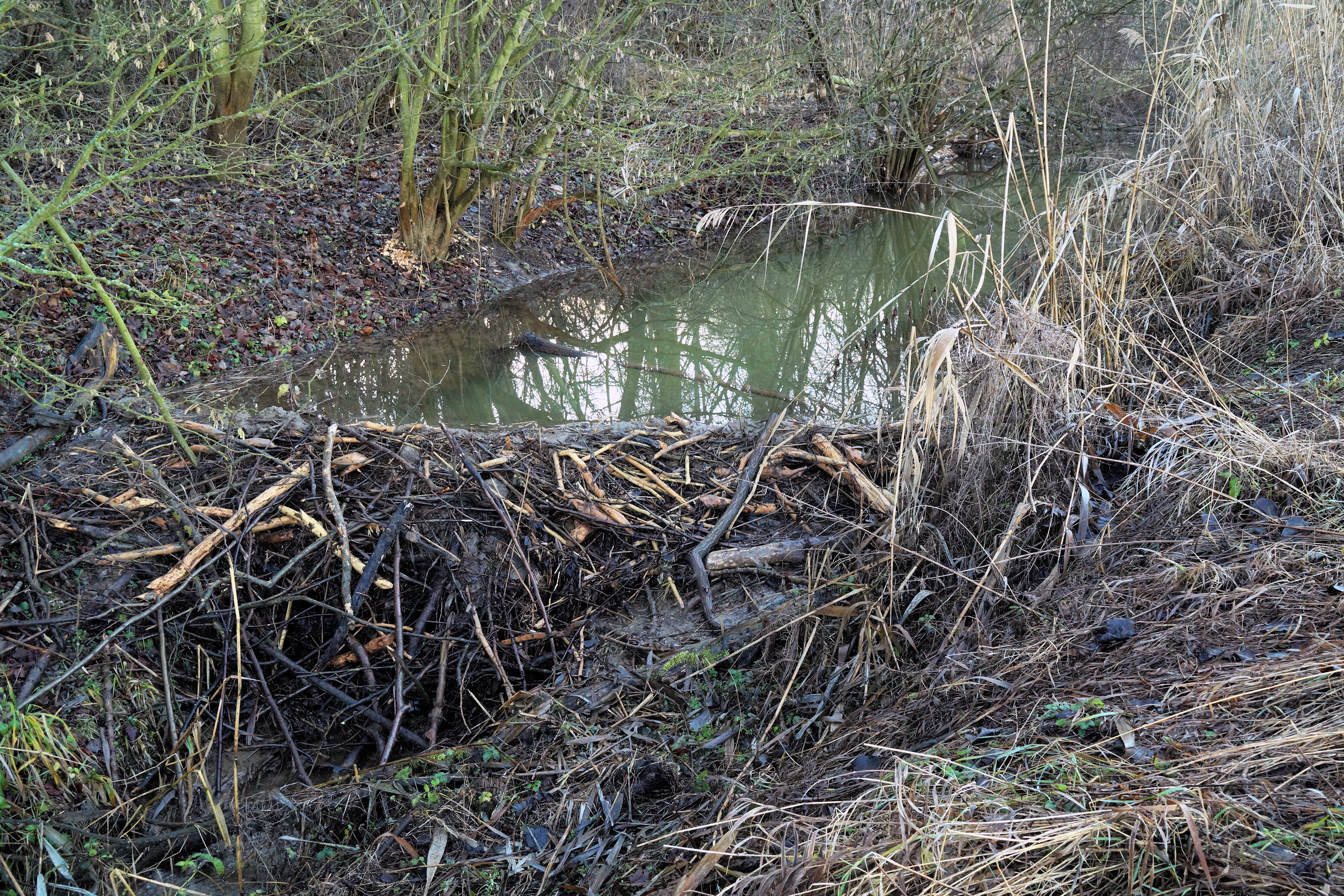 Schmida, Biberdamm - Dez.2015